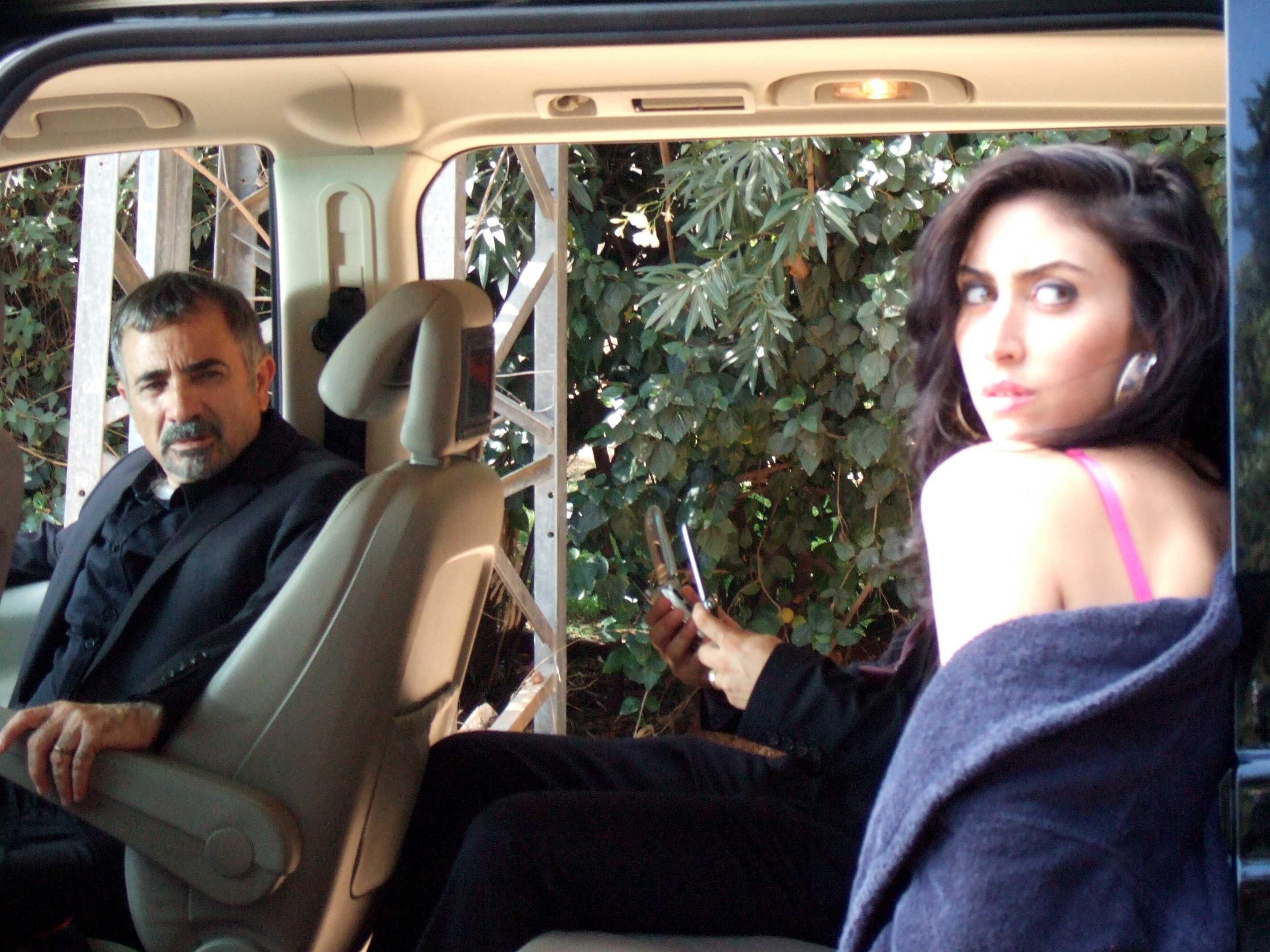 הילה סעדה ומשה איבגי בסט הבורר